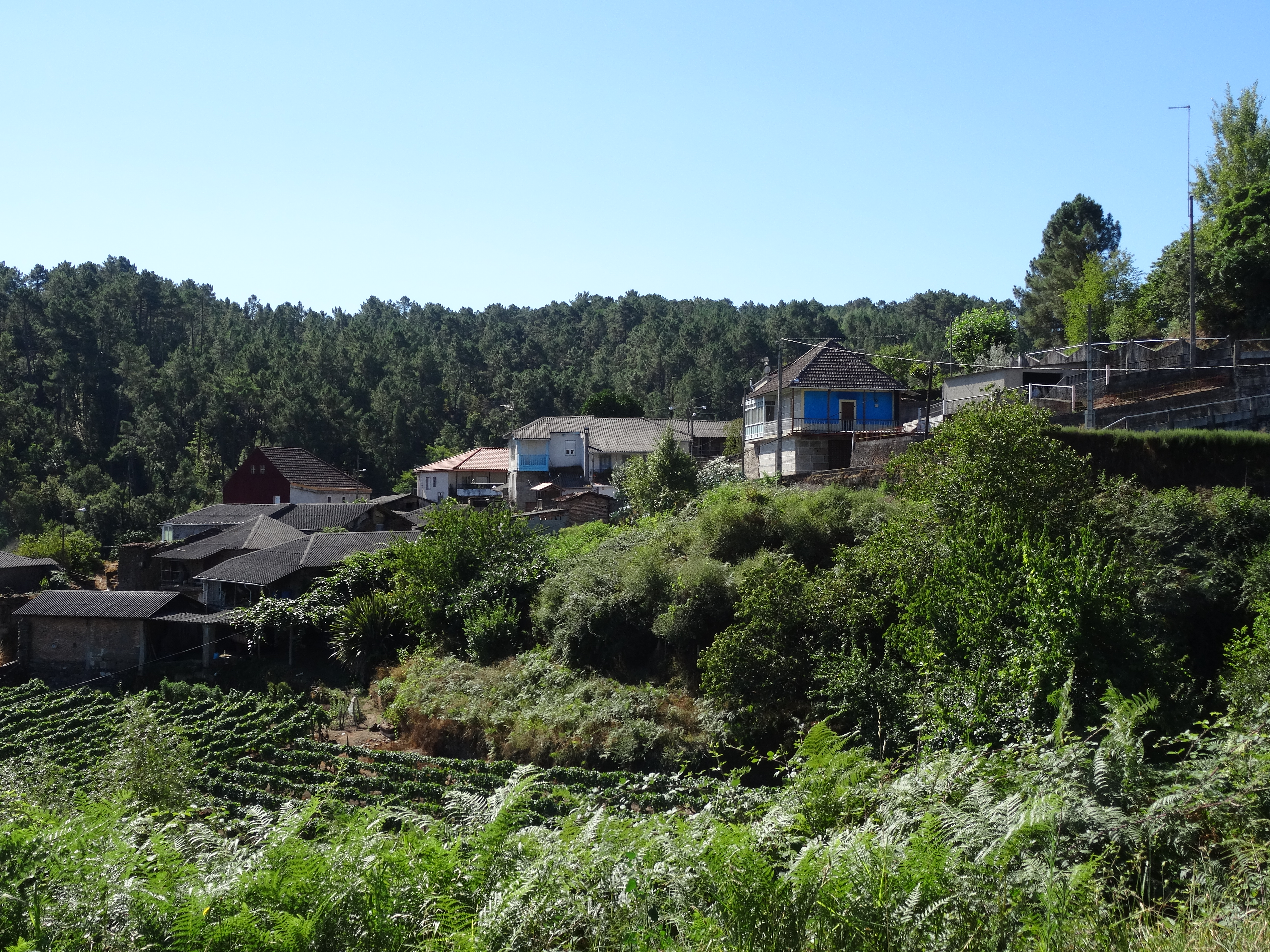 Ver título.